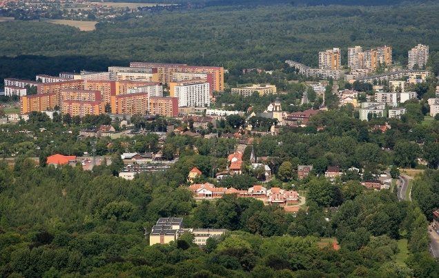 Bytom z lotu ptaka - Miechowice.